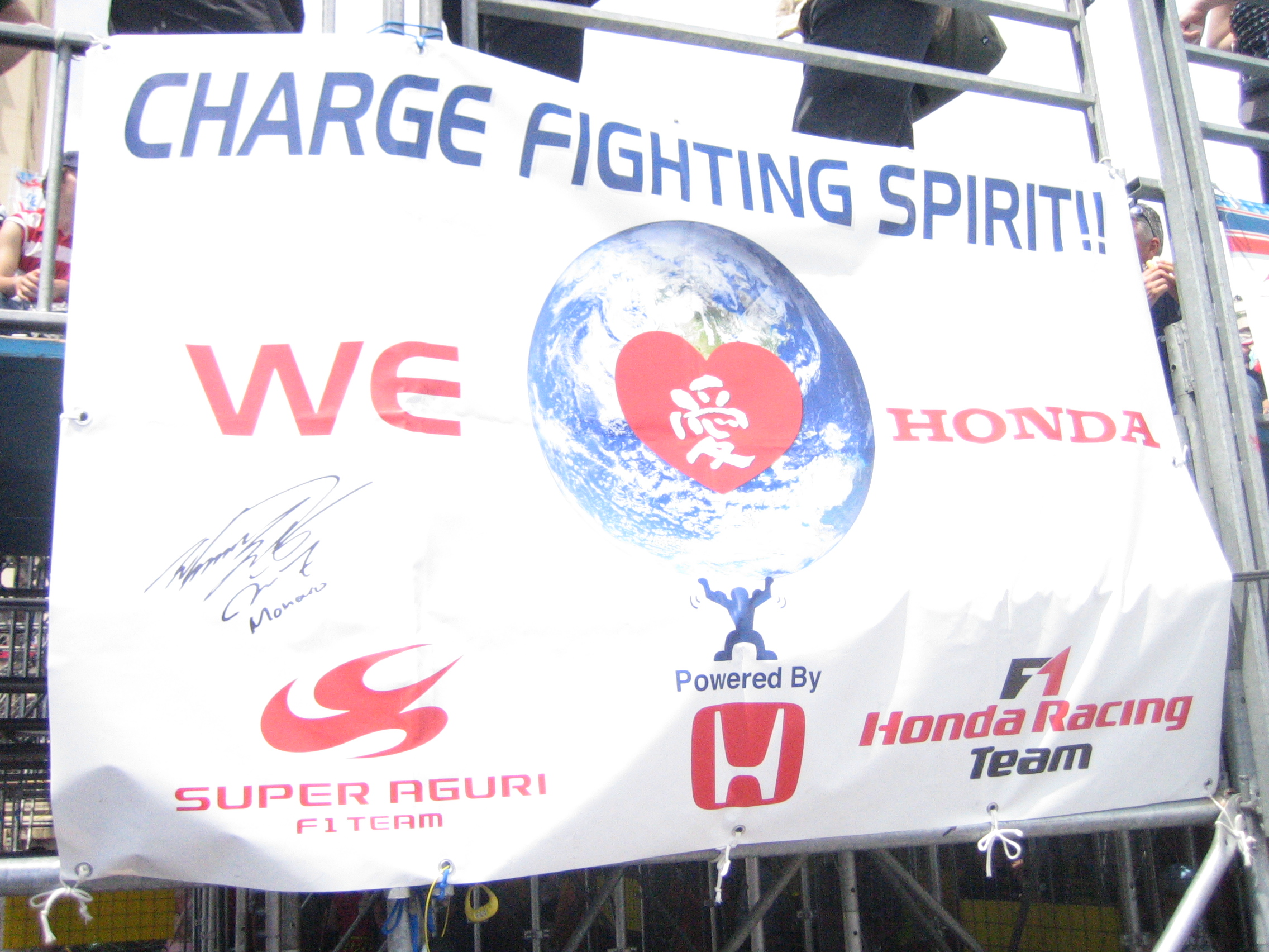 fans de super aguri